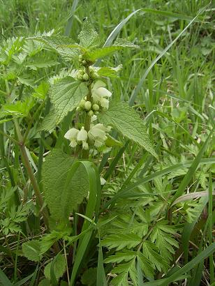 Foto genomen maart 2004 in Industriegebied Goudse poort, Gouda. Rechten hierbij onder gnu/fdl gebracht